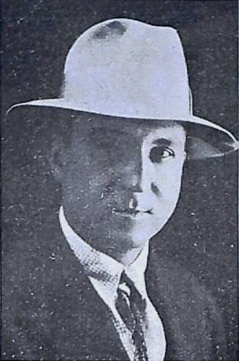 Primitivo Rodríguez Sanjurjo, fotografía en Vida Gallega 1932